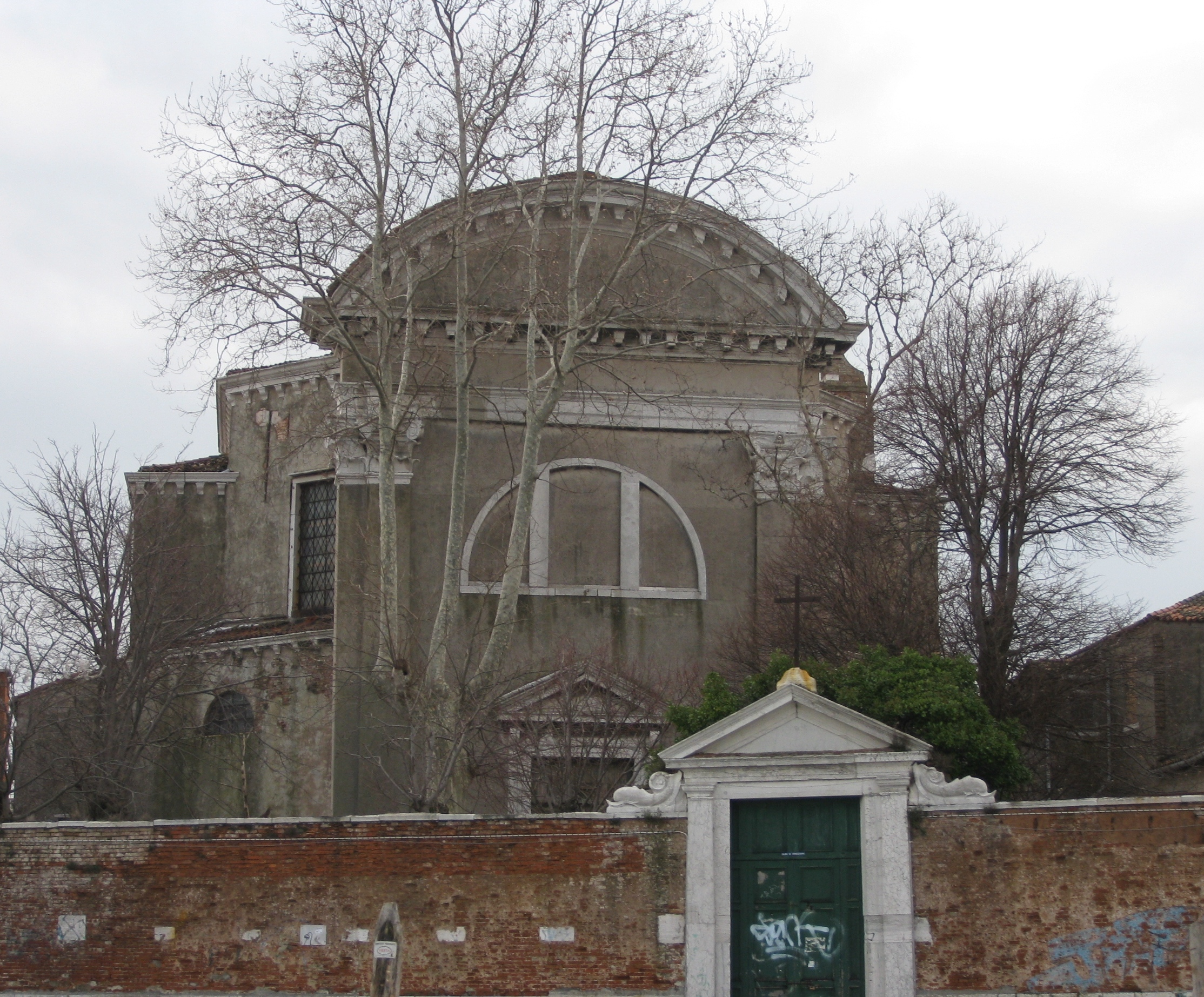 Venezia - Chiesa di Santa Maria del Pianto